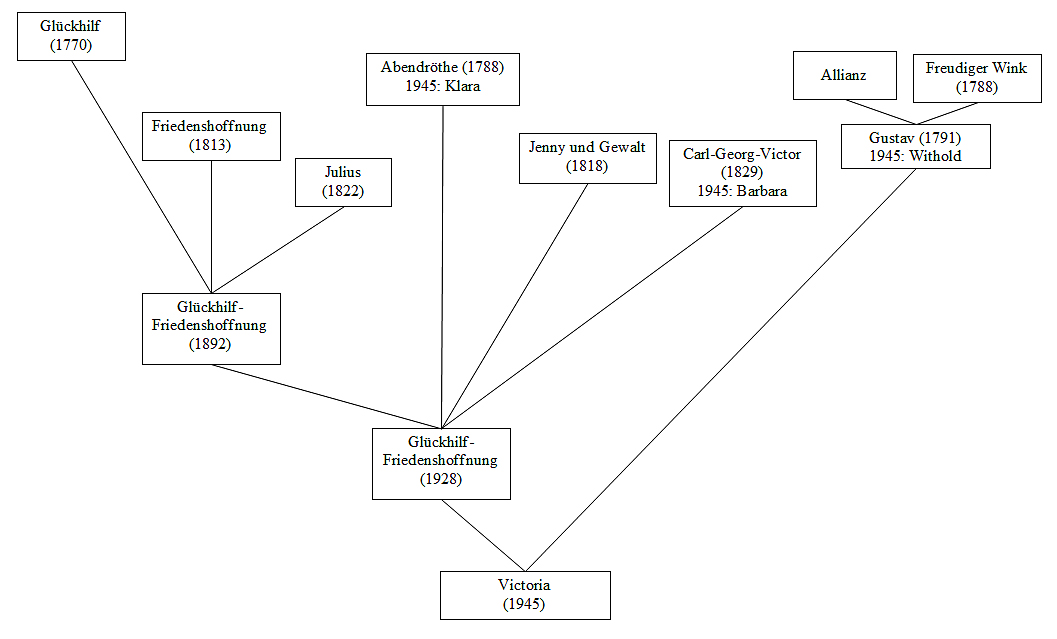 Niederschlesien Bergwerk Victoria Stammbaum der fusionierten Anlagen